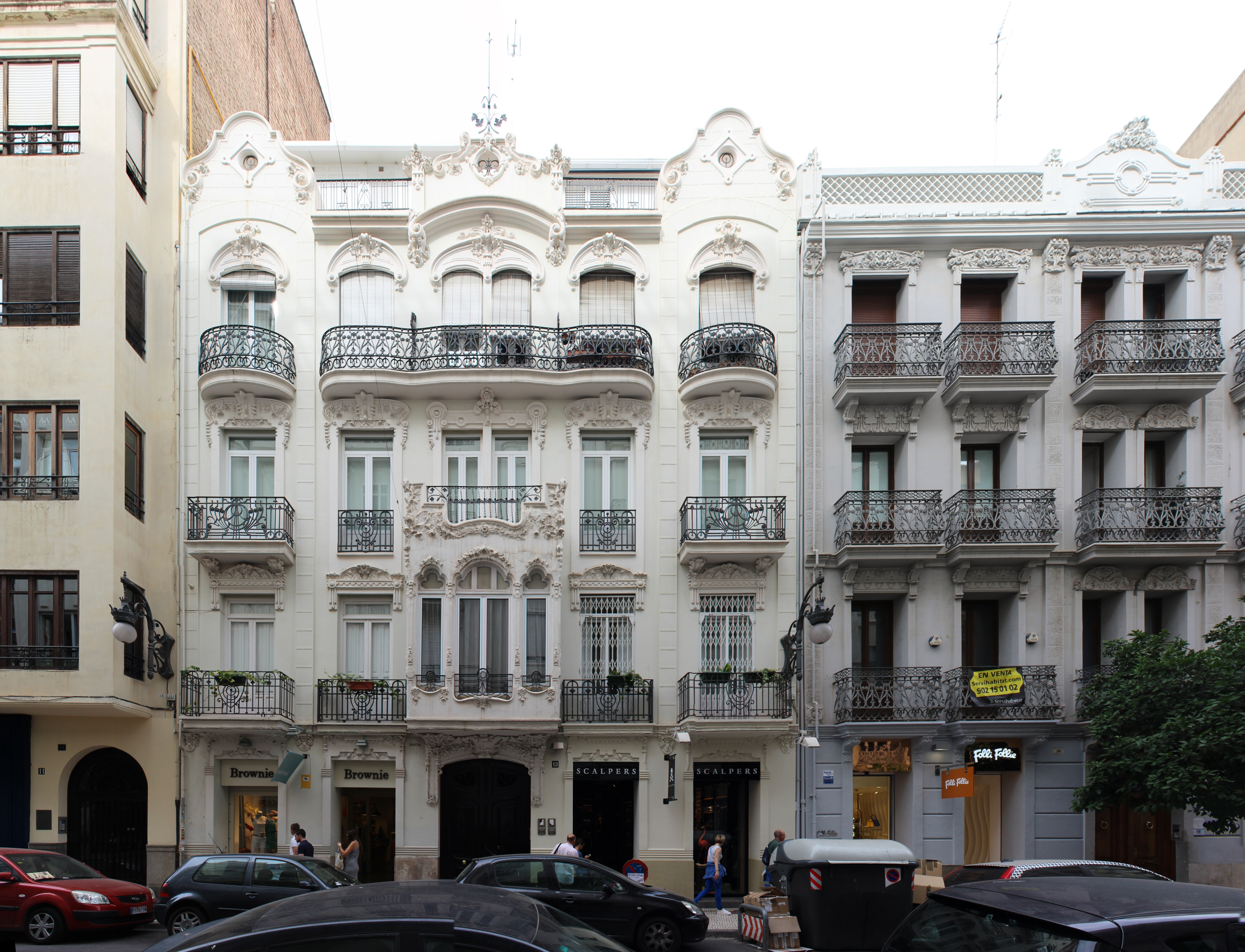 Casa de Salvador Llop de Manuel Peris Ferrando, calle de Jorge Juan 13, 1911, Valencia